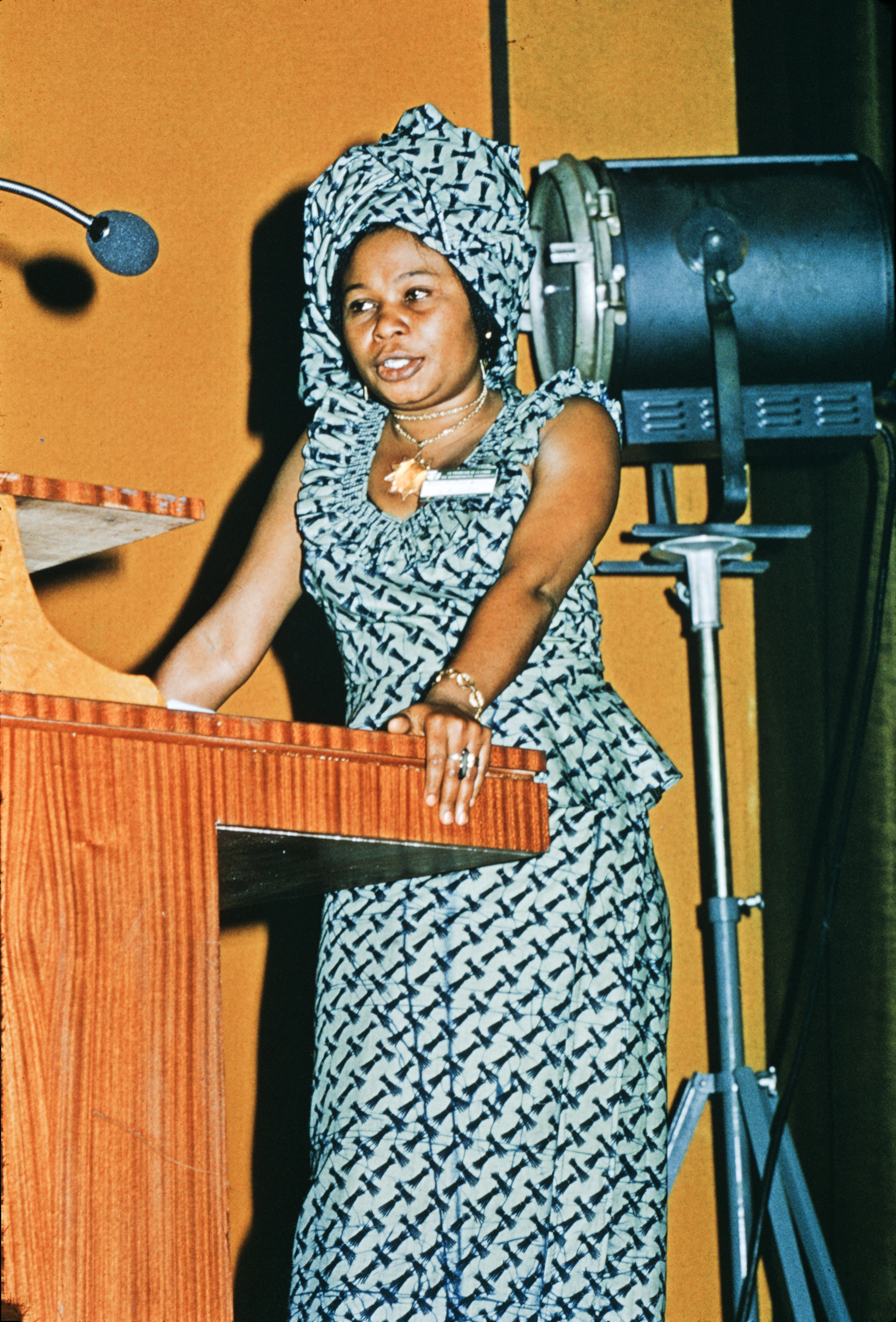 Colloque sur la promotion de la femme face aux responsabilités communales, organisé conjointement par l'Agence de coopération culturelle et technique et la Fédération mondiale des Villes jumelées à Lomé au Togo du 26 au 31 juillet 1975. Yvonne Félix-Tchicaya, première conseillère auprès du Ministre des affaires sociales de République populaire du Congo.